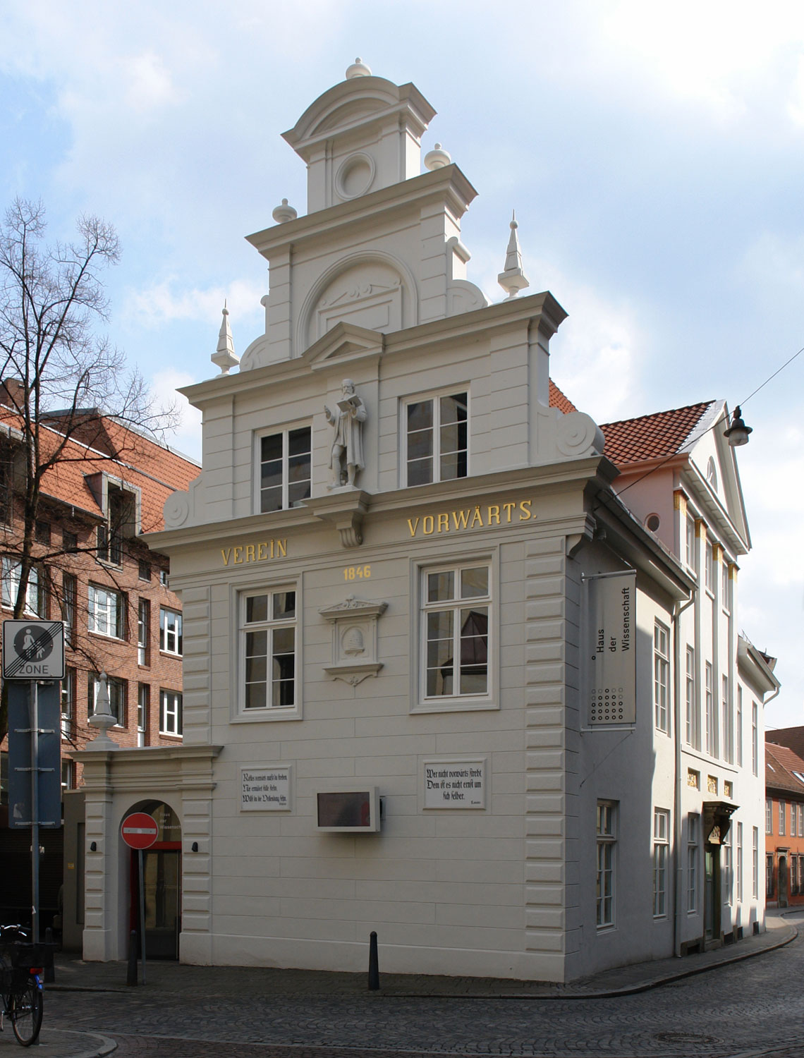 Bremen: Haus Vorwärts in der Sandstraße 4-5 Das abgebildete Objekt ist ein geschütztes Kulturdenkmal in der Freien Hansestadt Bremen, mit der Nr. 1098 beim Landesamt für Denkmalpflege registriert.